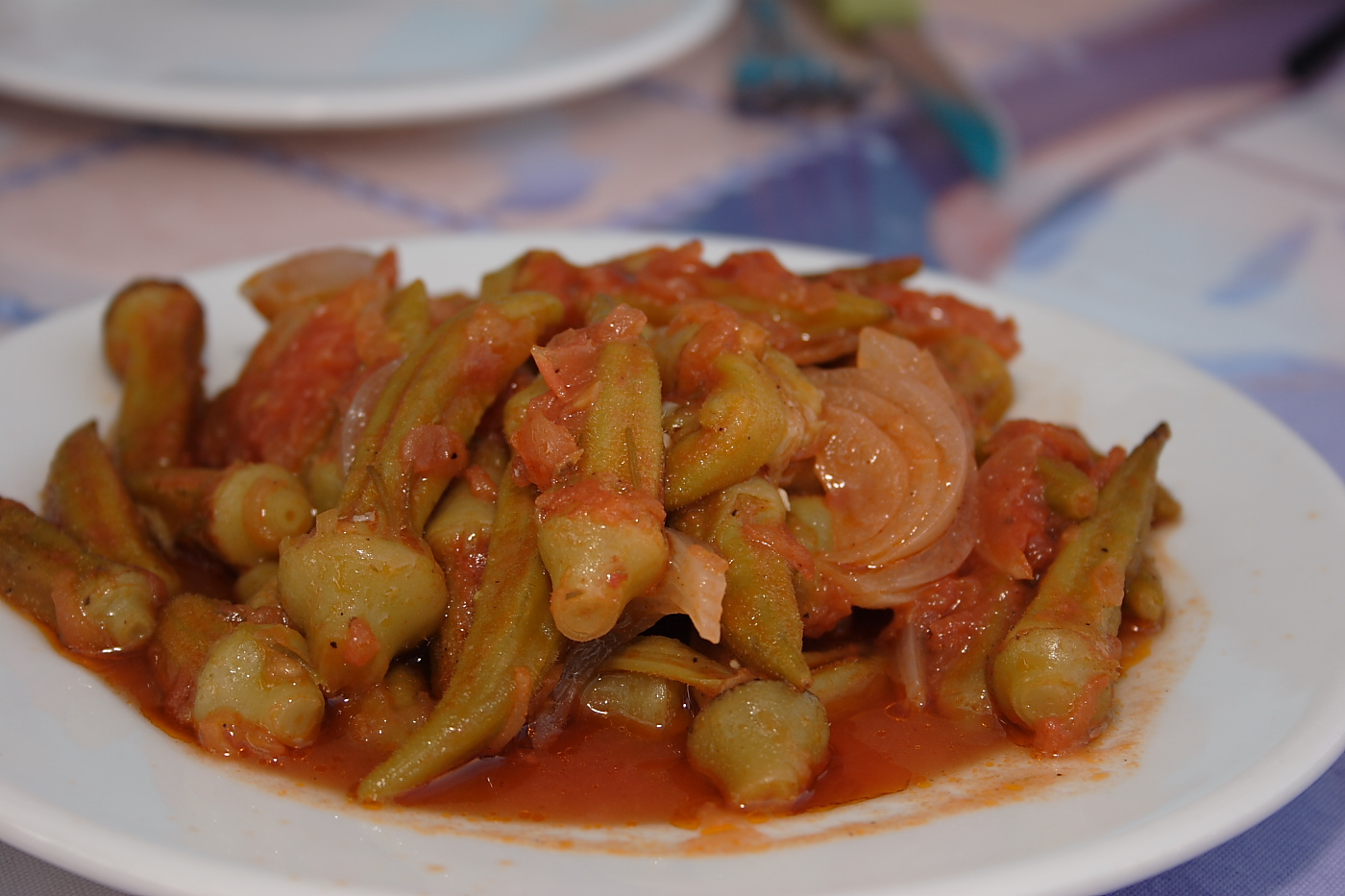 Bamies Laderes - Okras in tomato-oil-sauce.